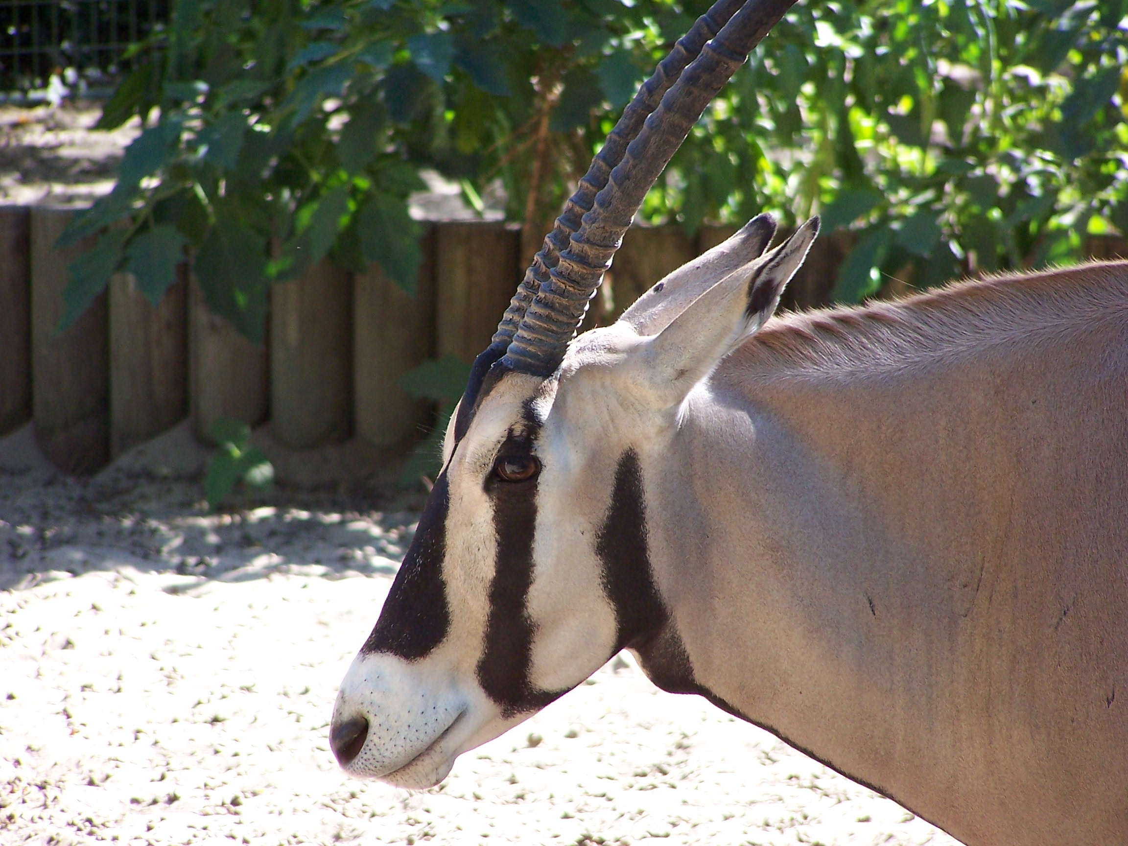 Photographie d'un oryx beïsa (Oryx gazella beisa) prise au Zoo de la Palmyre. L'oryx beïsa est un herbivore que l'on retrouve principalement dans les steppes et déserts de la Corne de l'Afrique (Erythrée, Djibouti, Éthiopie, Somalie), ainsi que partiellement en Tanzanie. Il est facilement reconnaissable à la couleur de sa robe : fauve sur le corps, ventre blanc, bande horizontale foncée à la limite des flancs et du ventre, haut des antérieurs cerclés d'une bande foncée qui remonte jusque dans la cou, bandes noires le long du museau et sur les yeux, bout du museau blanc. Il est également doté de 2 longues et fines cornes, légèrement courbées, qui atteignent facilement plus d'un mètre de longueur. Animal parfaitement adapté à la vie dans le désert, il est capable de faire varier la température de son corps, emmagasinant de la chaleur le jour et la libérant la nuit, afin d'éviter la transpiration (qui est alors nulle en dessous de 40°C). Toujours dans le but d'économiser l'eau, ses urines sont peu abondantes et très concentrées.